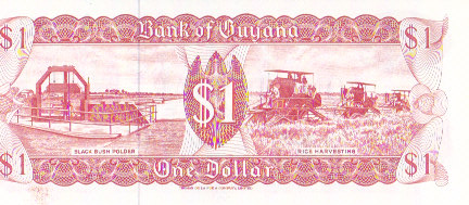 Billete sin posibilidad de uso, fuera de su circulación, obtenido por colección